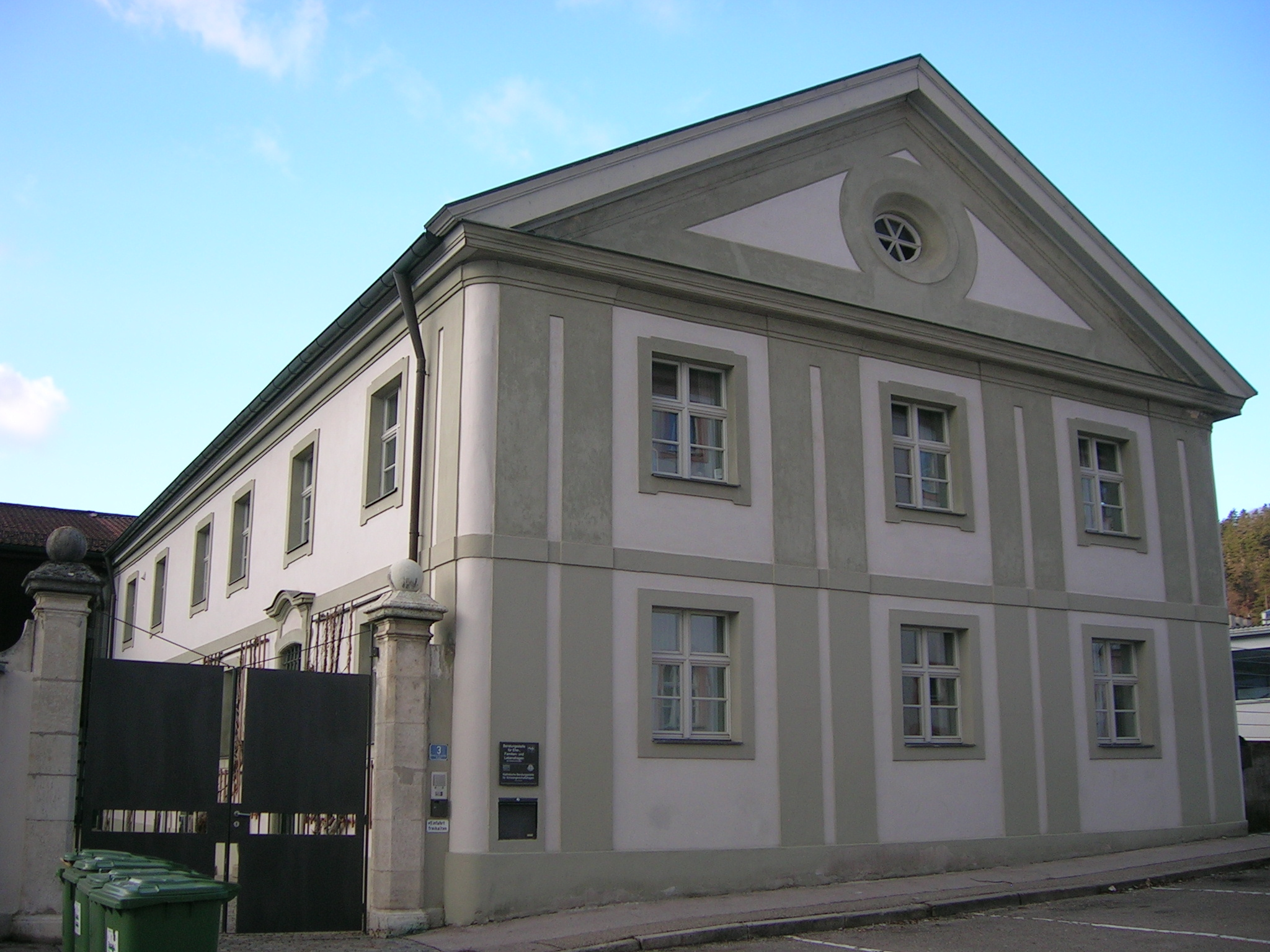 Kardinal-Preysing-Platz 3 Eichstätt: Ehemaliger Hofstall, langgestreckter Giebelbau, mit Putzgliederungen, 1. Hälfte 18. Jh.; südlich anschließend Toreinfahrt und Gartenmauer, wohl Mitte 19. Jh.